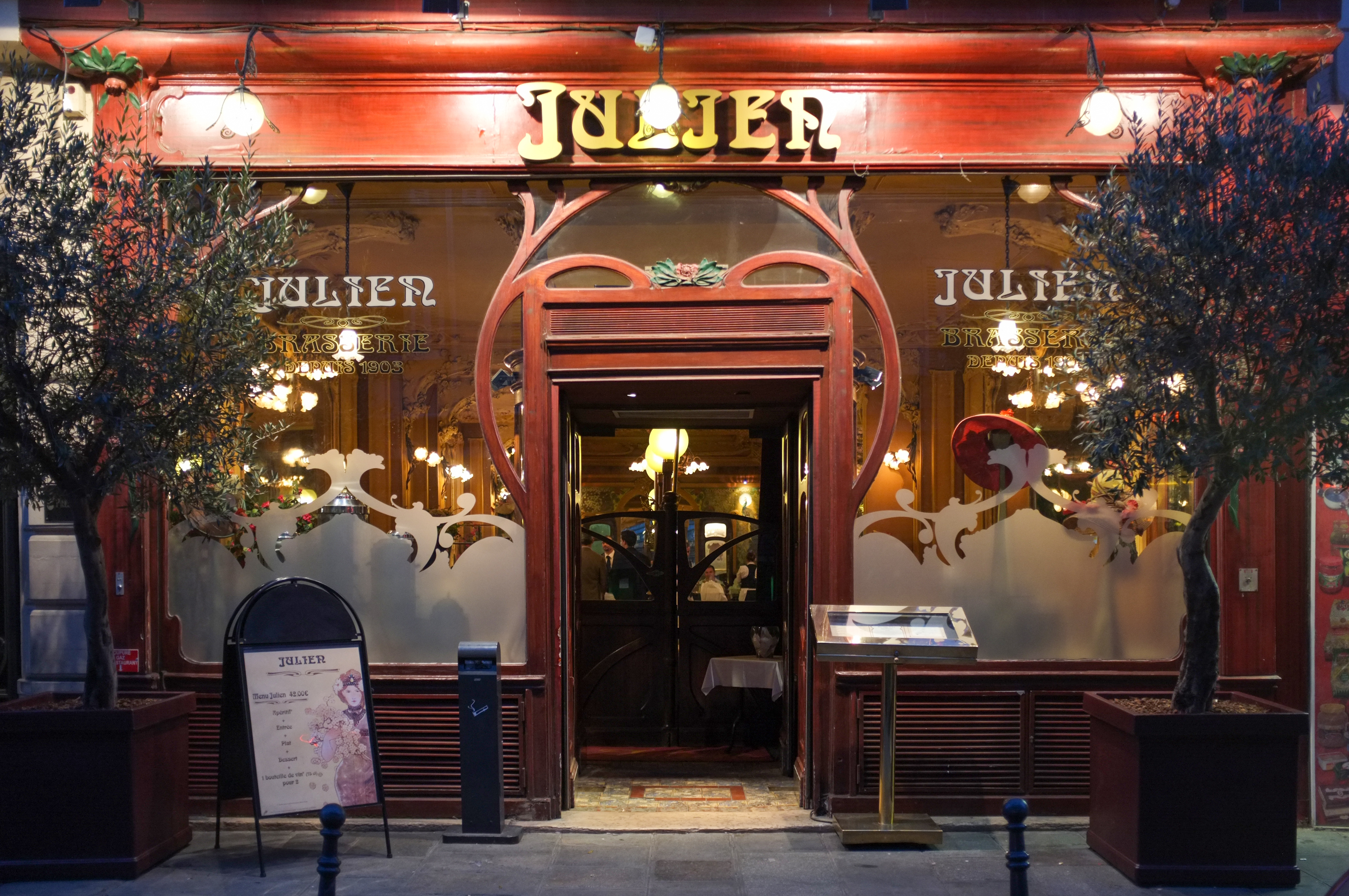 Façade du Restaurant Julien, 16bis rue du Faubourg Saint-Denis (Paris)